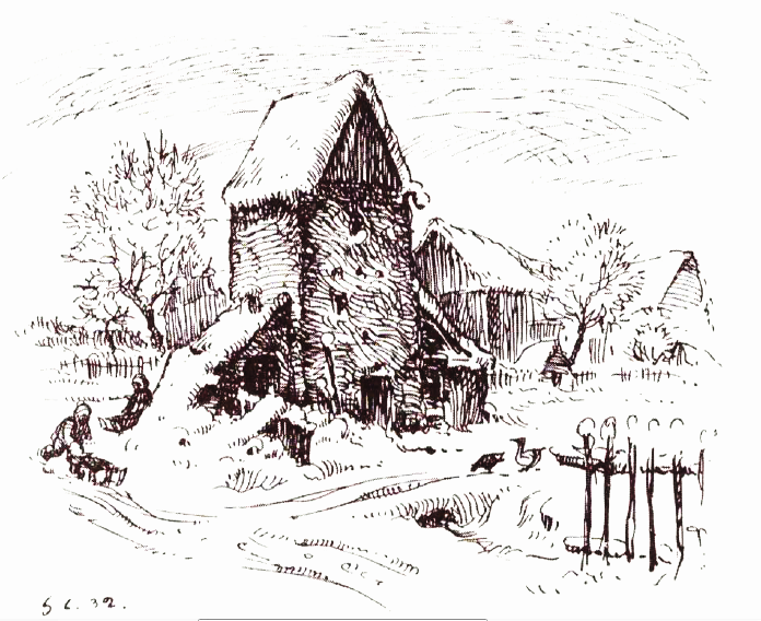 Turm zu Schönleiten (1932)